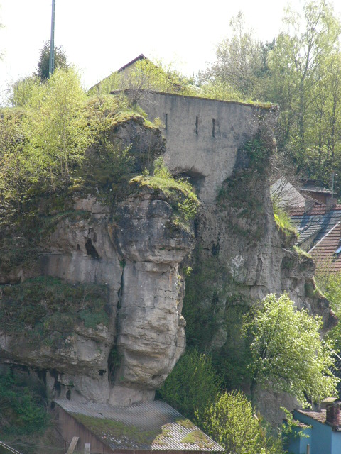 Ruine Krögelstein